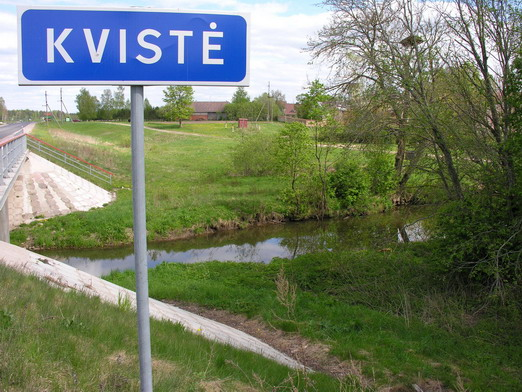 Kvistė, upė Mažeikių raj. Foto: Algirdas, 2006 m. gegužės 17 d.